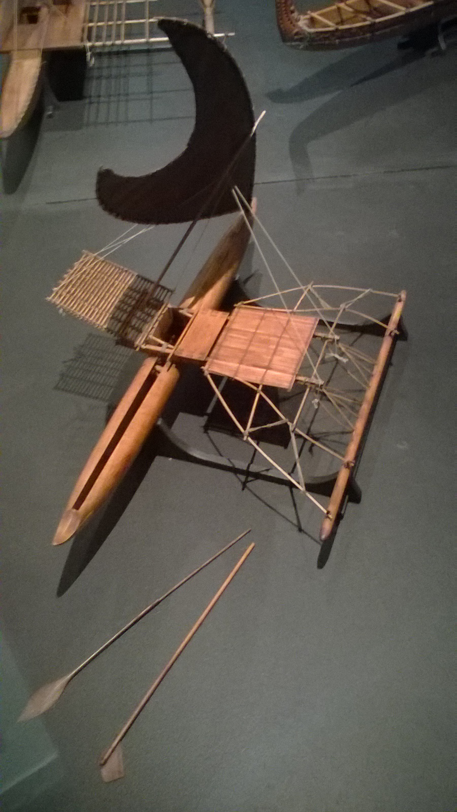 Maquette 1/16 Iles Santa cruz (1828 voyage de L'Astrobale) réalisée sous la direction de l'Amiral Pâris.